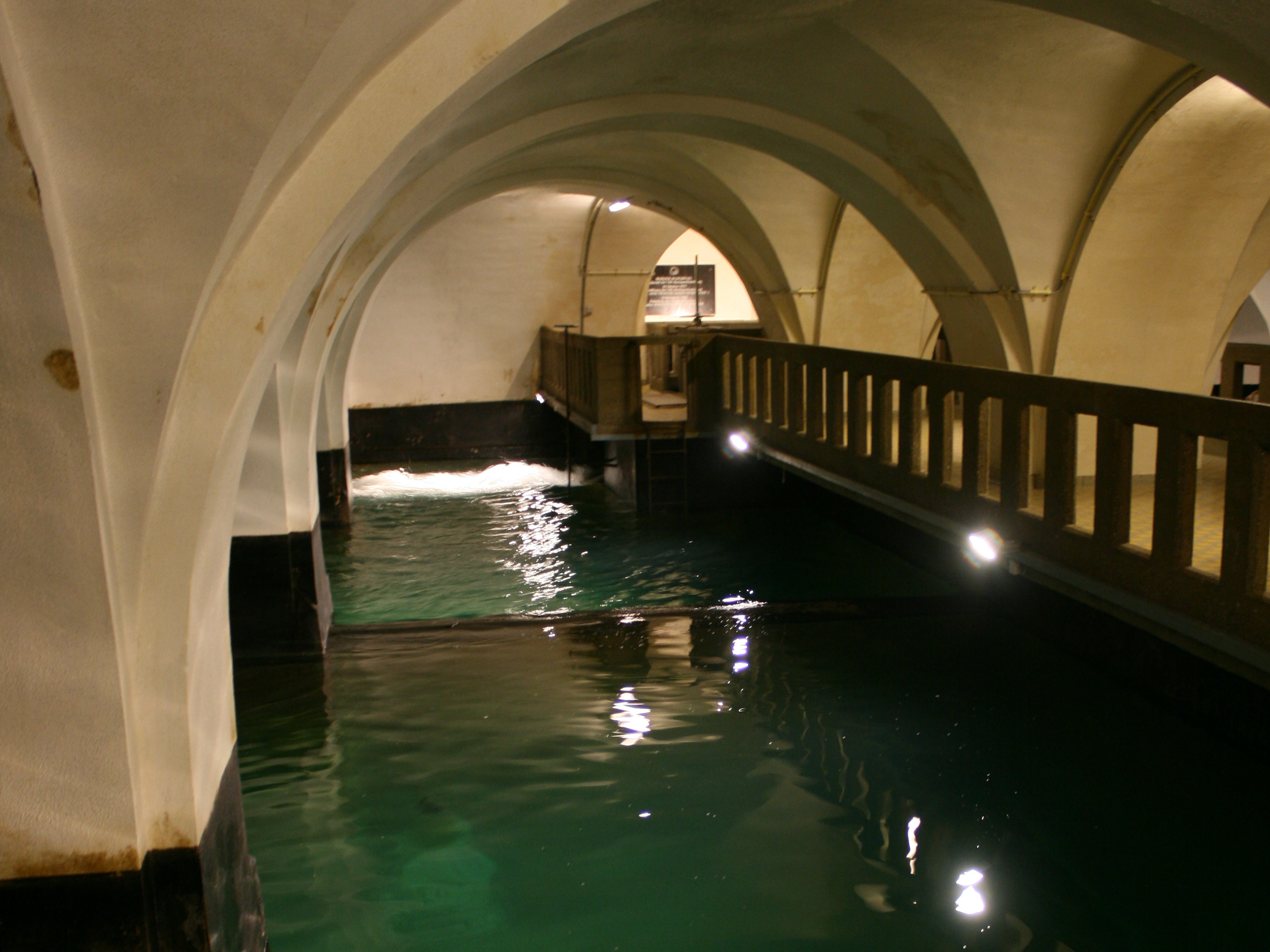 Behälter Rosenhügel von Innen